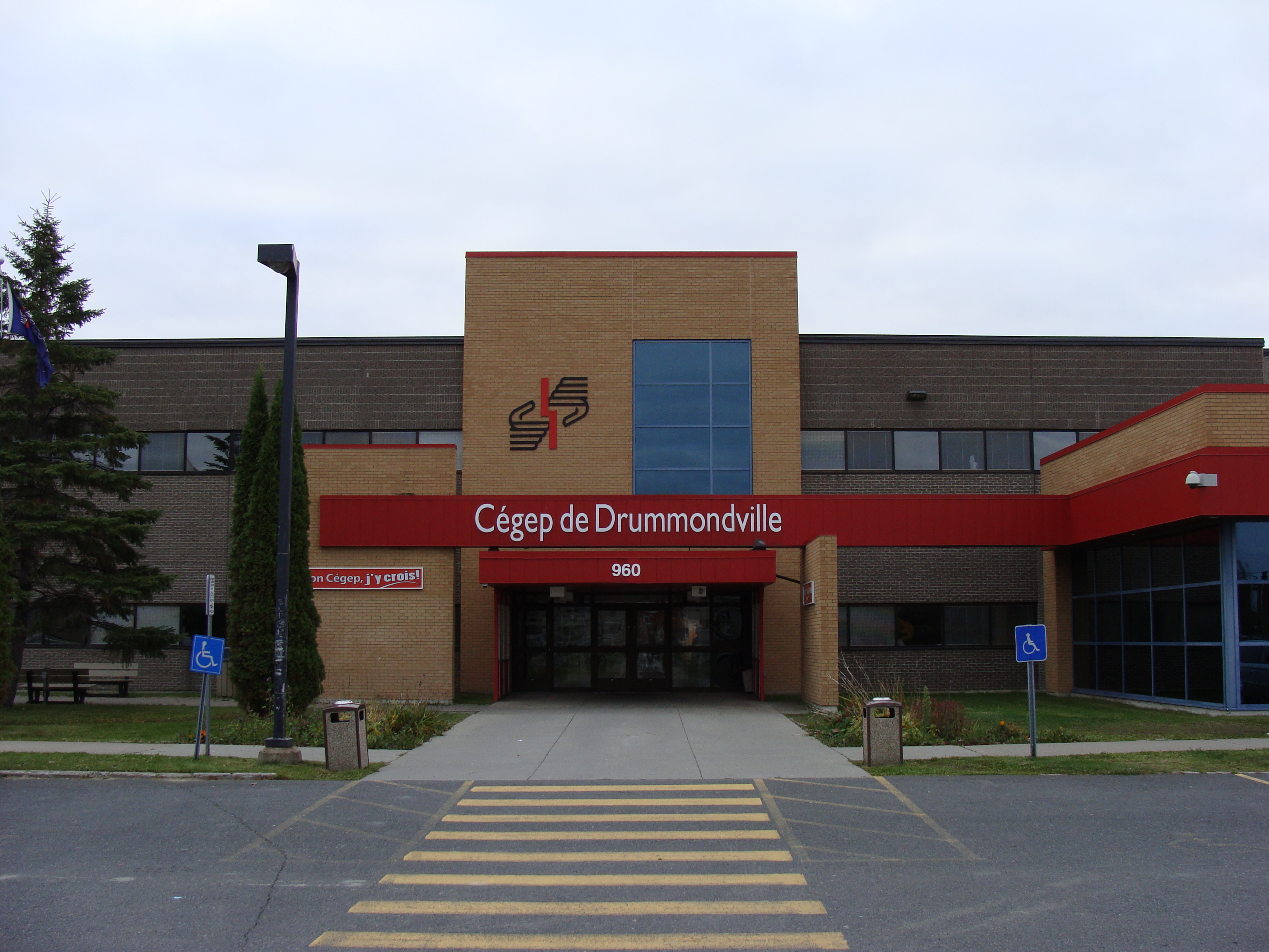 Entrée principale du Cégep de Drummondville, au Québec.